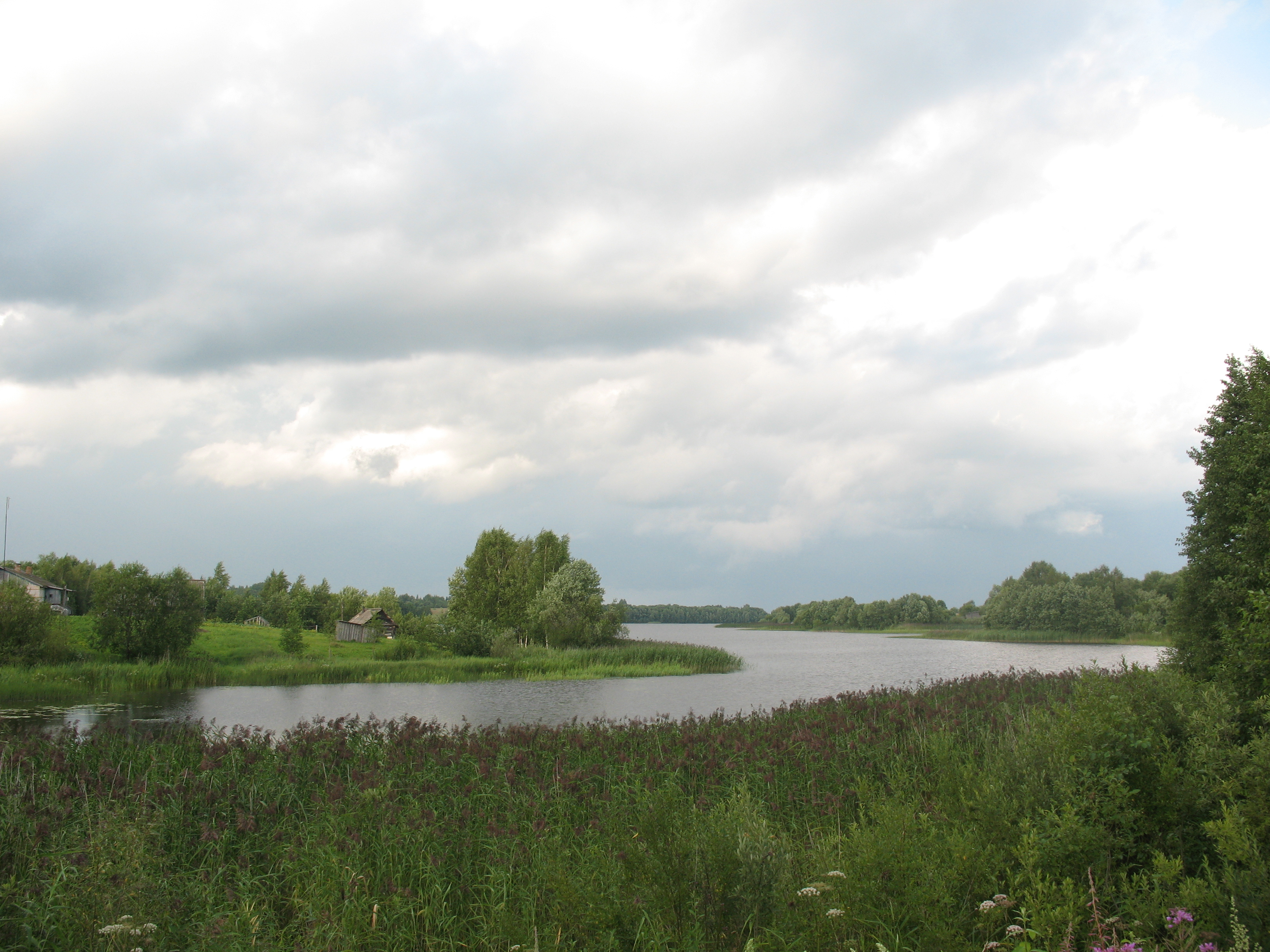 Островенское озеро, деревня Глебово, Мошенской район Новгородской области